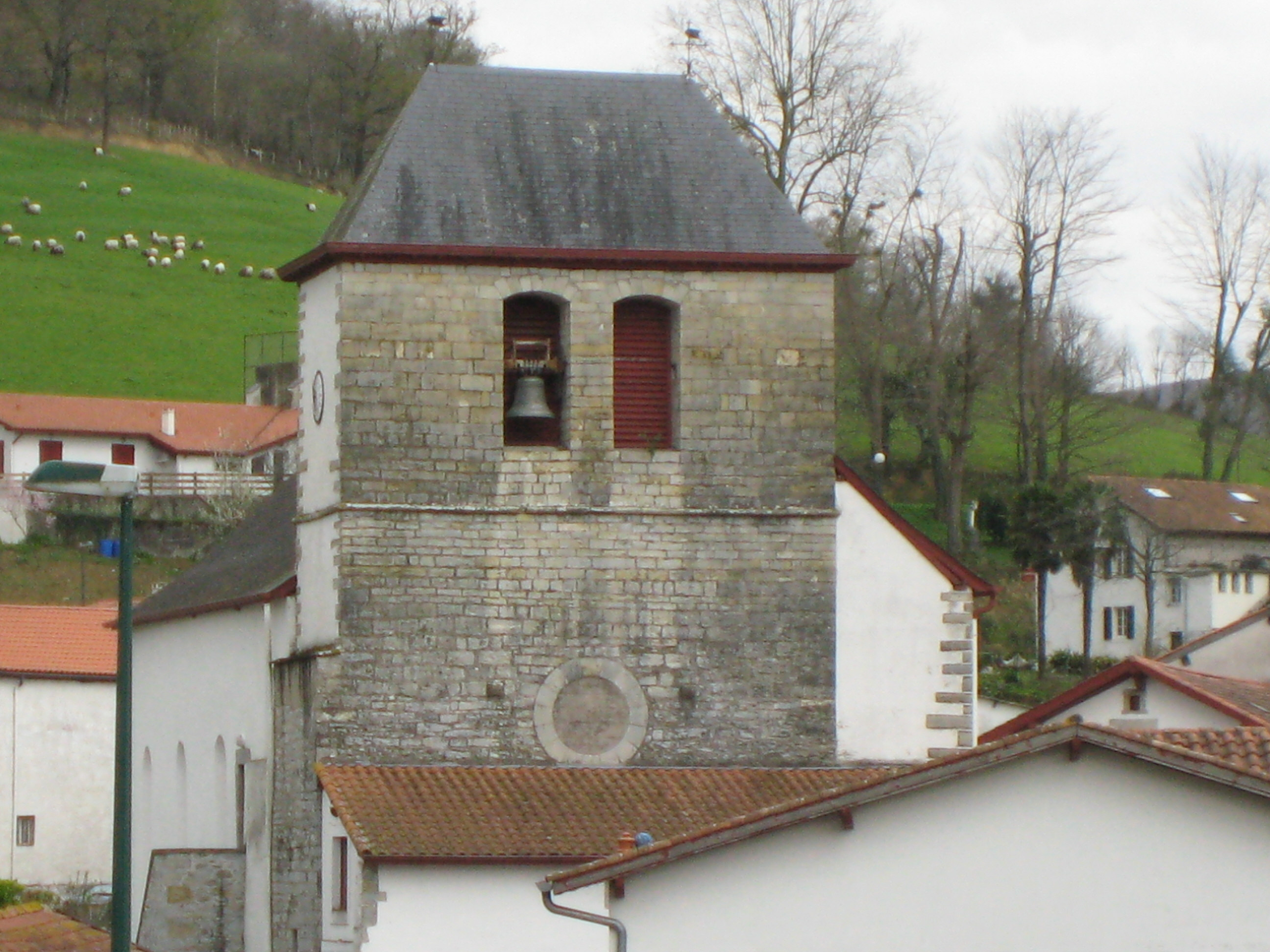 Eglise de Musculdy (Soule) (Pyrénées-Atlantiques) (Pyrénées).